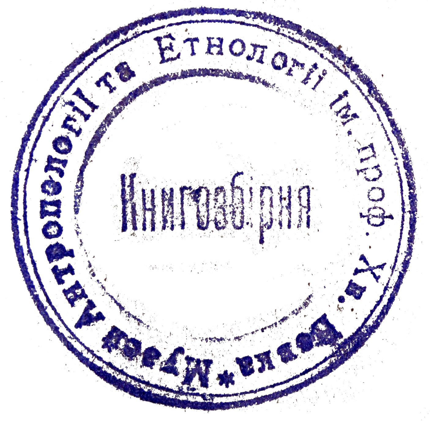 Екслібрис проесора Федіра Вовка